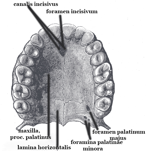 palatum durum..modification of original image